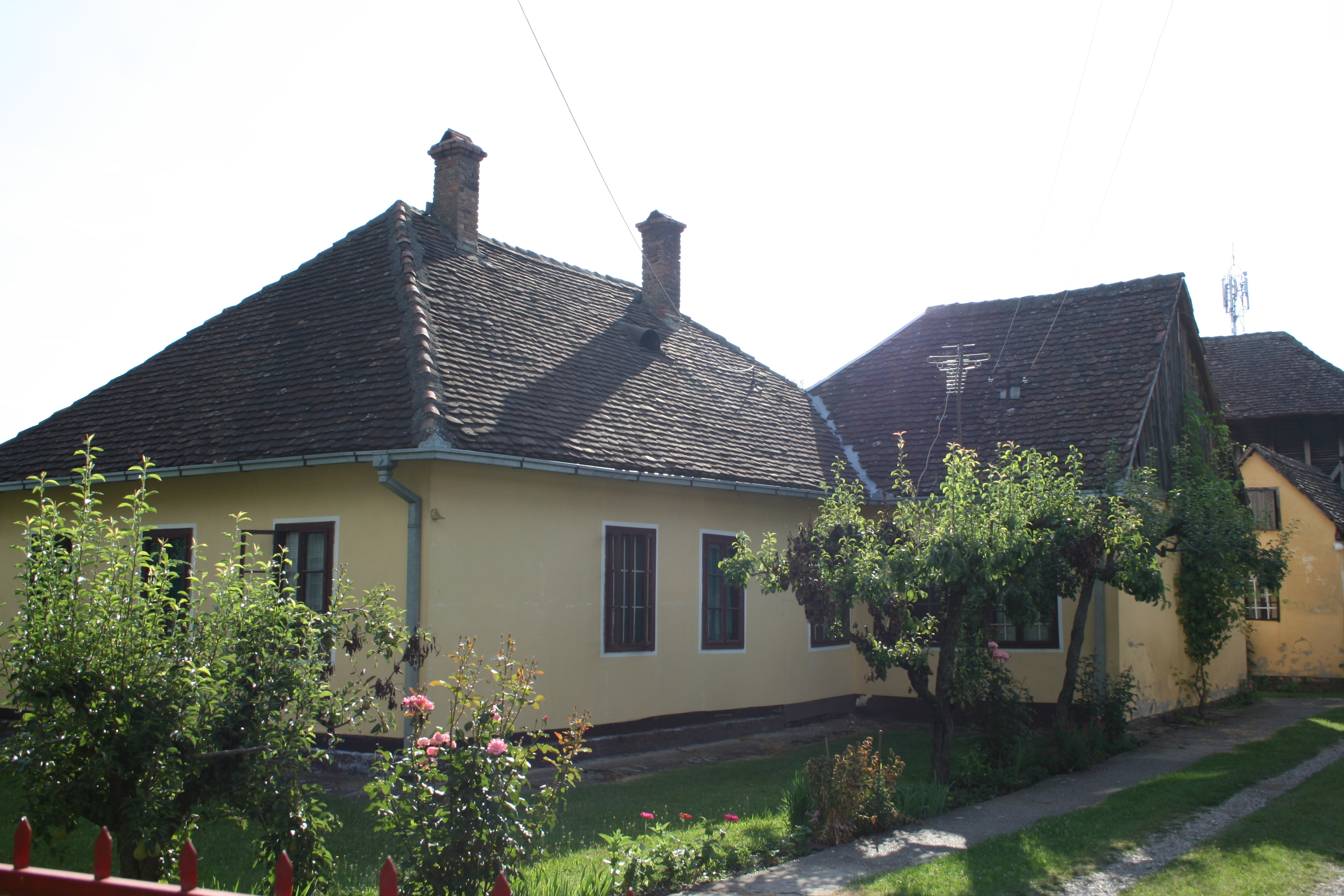 Dvorište u kojo se nalazi vajat Hajduk Veljka, Crna Bara